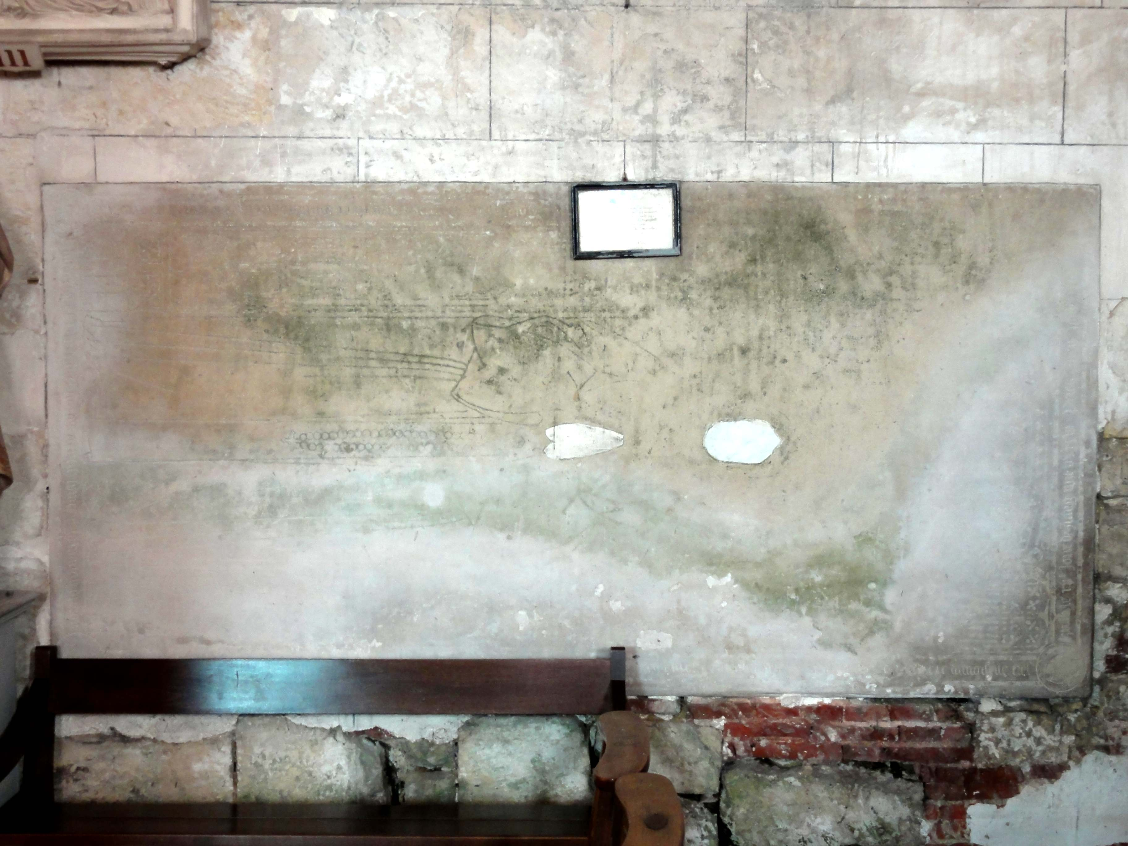 Bas-côté nord, dalle funéraire (voir la transcription).